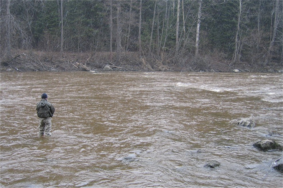 Fisherman during weak snow shower, Pitkäkoski in Vantaanjoki river between Helsinki and Vantaa, in Finland. (In Finnish: Viehekalastaja heikon lumikuurn aikana, Vantaanjoen Pitkäkoski Helsingin ja Vantaan rajalla)